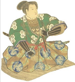 菊池武朝の肖像。